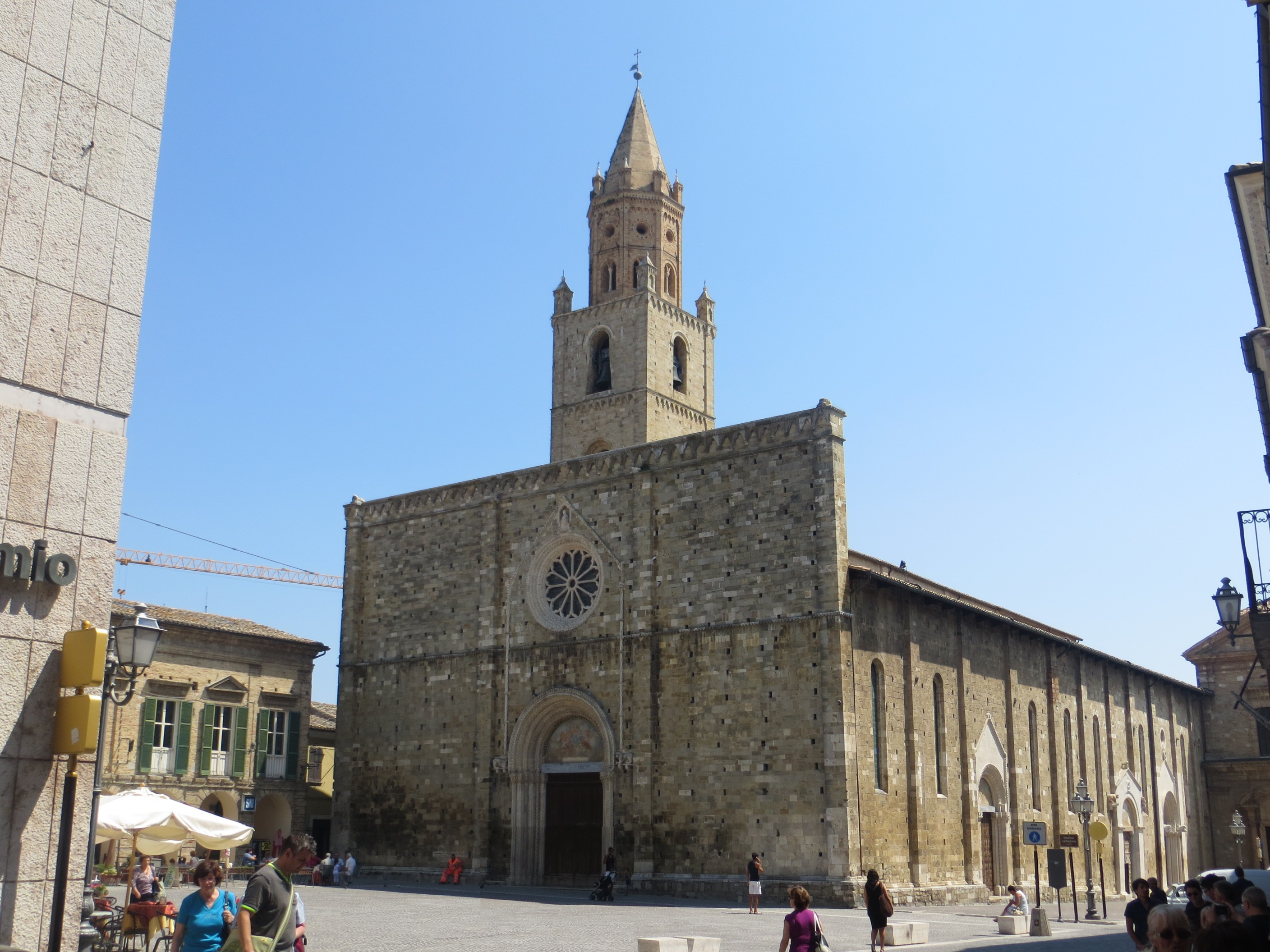 Veduta del Duomo di Atri